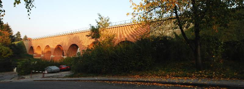 Der zwischen 1999 und 2004 restaurierte Aquädukt Speising der I. Wiener Hochquellenwasserleitung über die Tullnertalstraße in Wien-Liesing